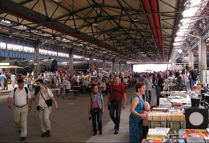 Blick in die Lokhalle des Dampflokwerkes Meiningen während der Dampfloktage 2005 Autor+Fotograf: kramer96 (2005)